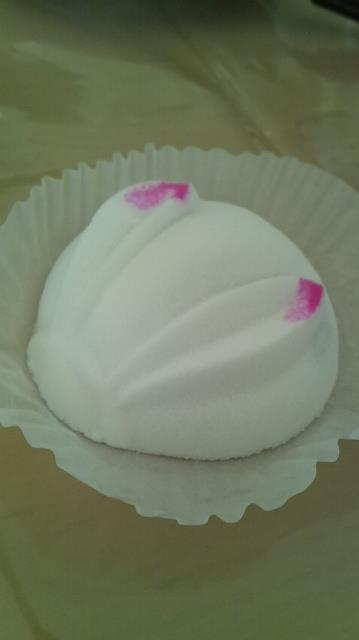 玉兎（大）あんこ入り